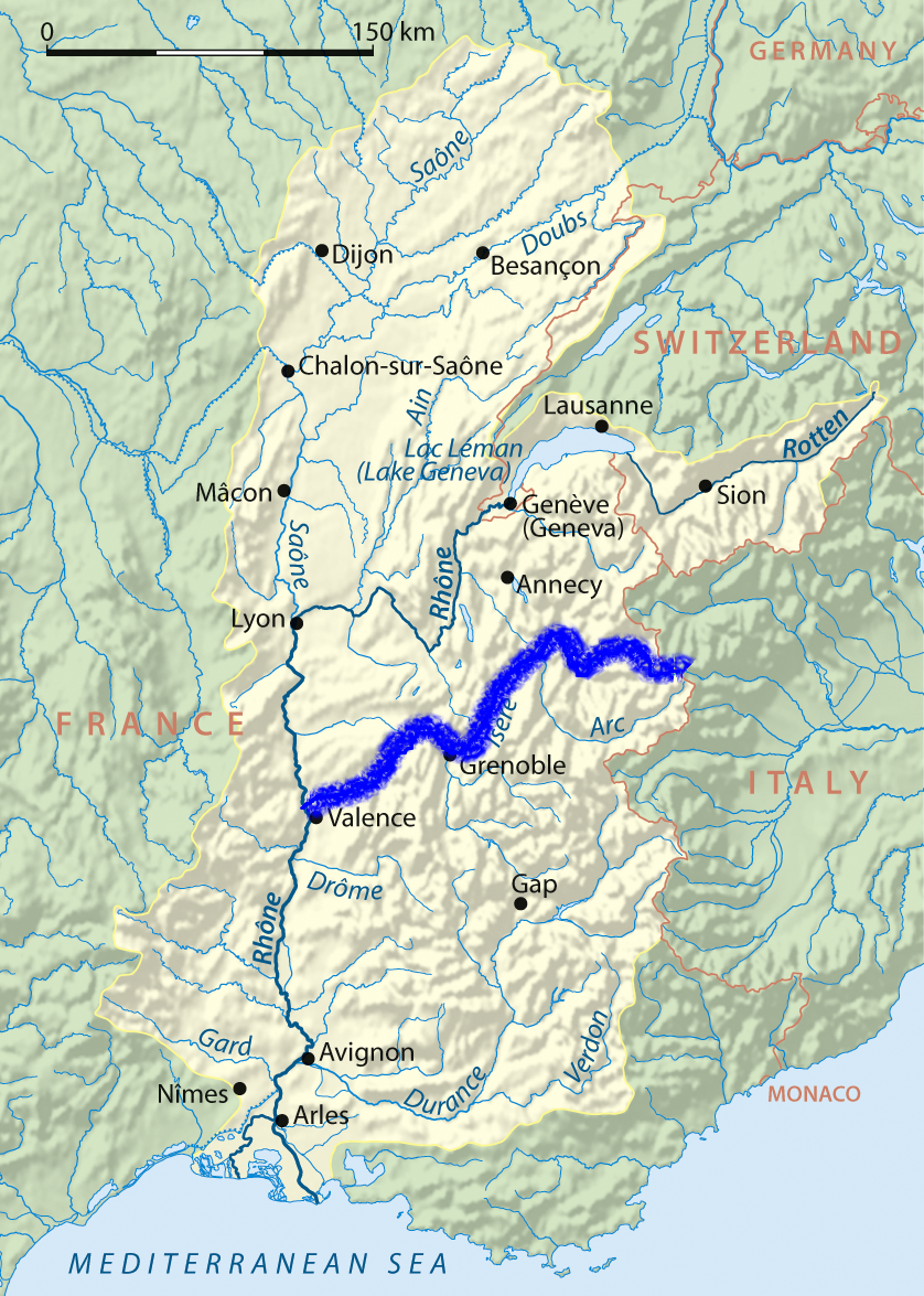 תוואי נהר איזר. מקור: File:Rhone drainage basin.png